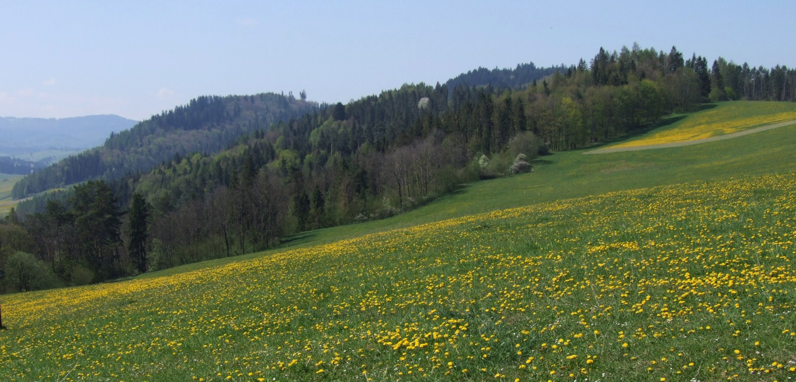 Od lewej: Hombark i Cisowka w Pieninach spiskich. Widok z polany Cisówka